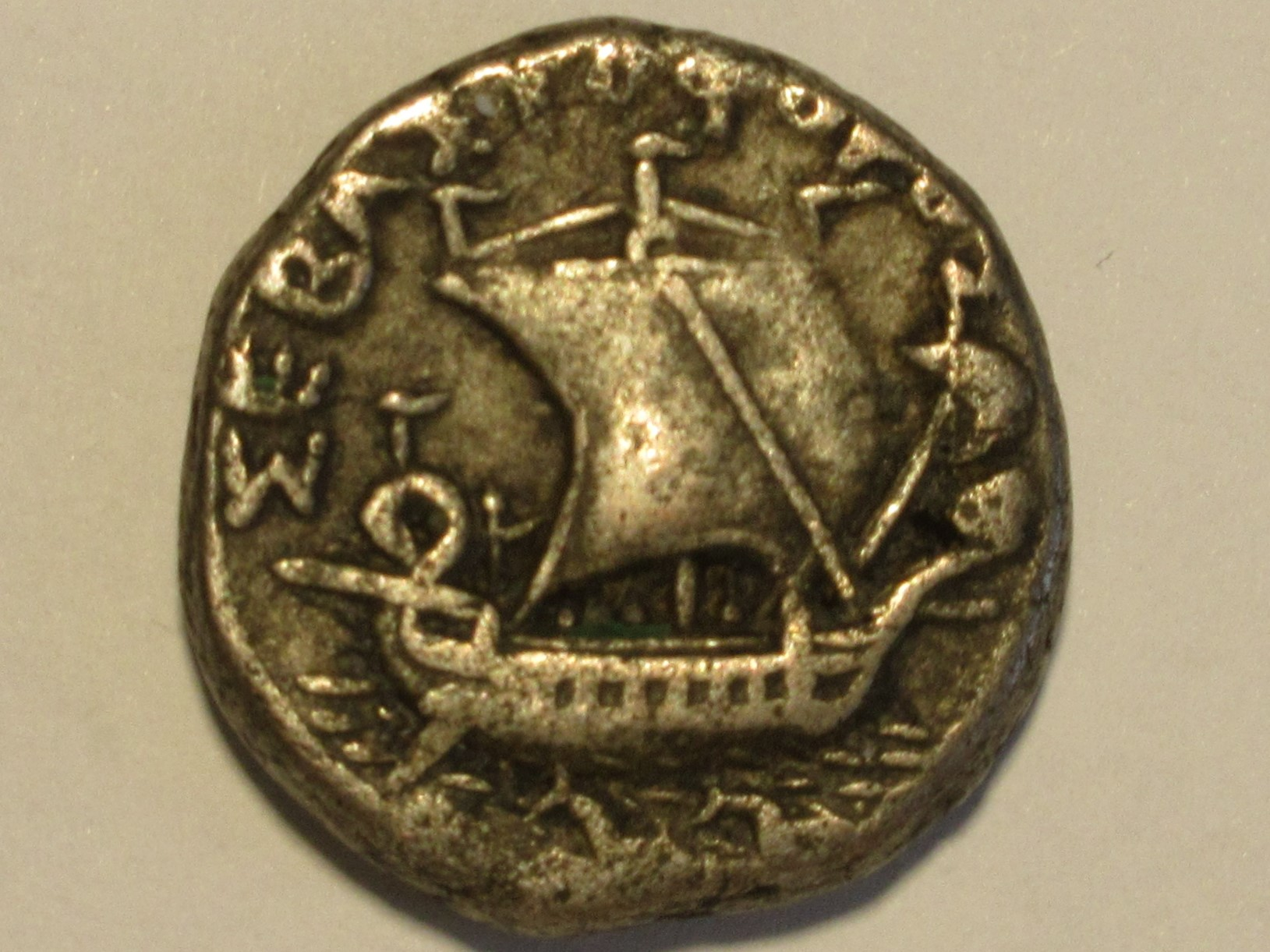 Tetradrachme aus Alexandria, z.Zt. Neros, Kampmann/Ganschow 14.99